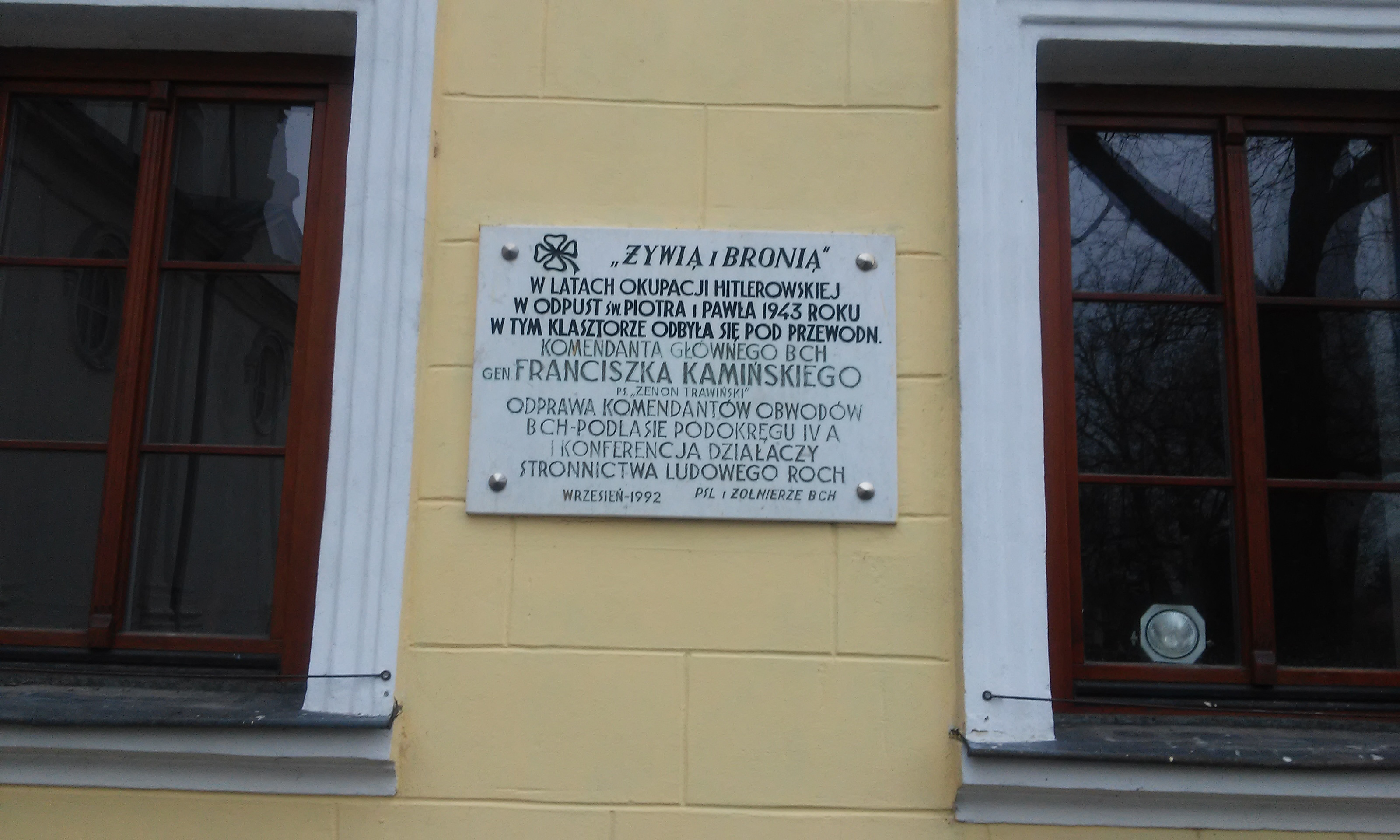 Tablica upamiętniająca odprawę komendantów oddziałów Batalionów Chłopskich w 1943 w klasztorze w Leśnej Podlaskiej